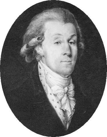 Nils Gustaf Palin, svensk diplomat och egyptolog.